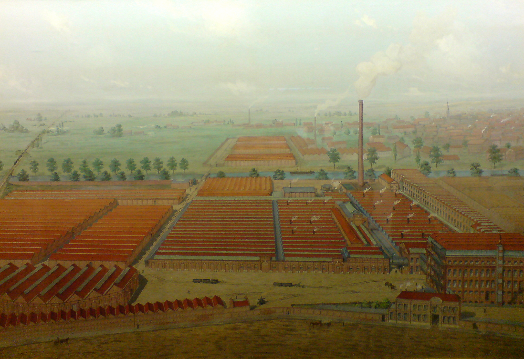 Photo des Gemäldes: Roubaix, vue du peignage Motte. Guache auf Papier, von Martiny. Ausgestellt im Museum für Kunst und Gewerbe von Roubaix.